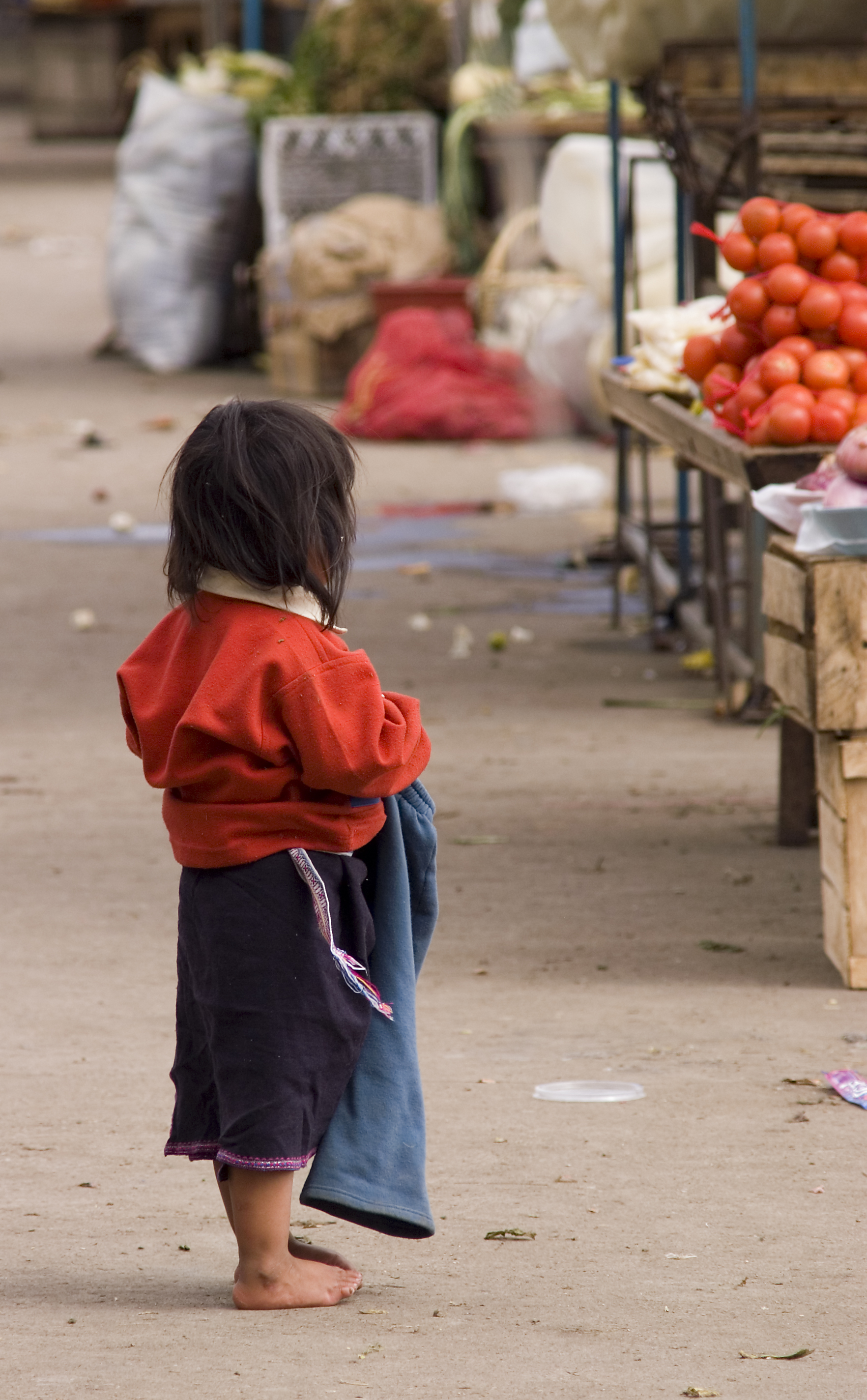 Saquisili, Ecuador